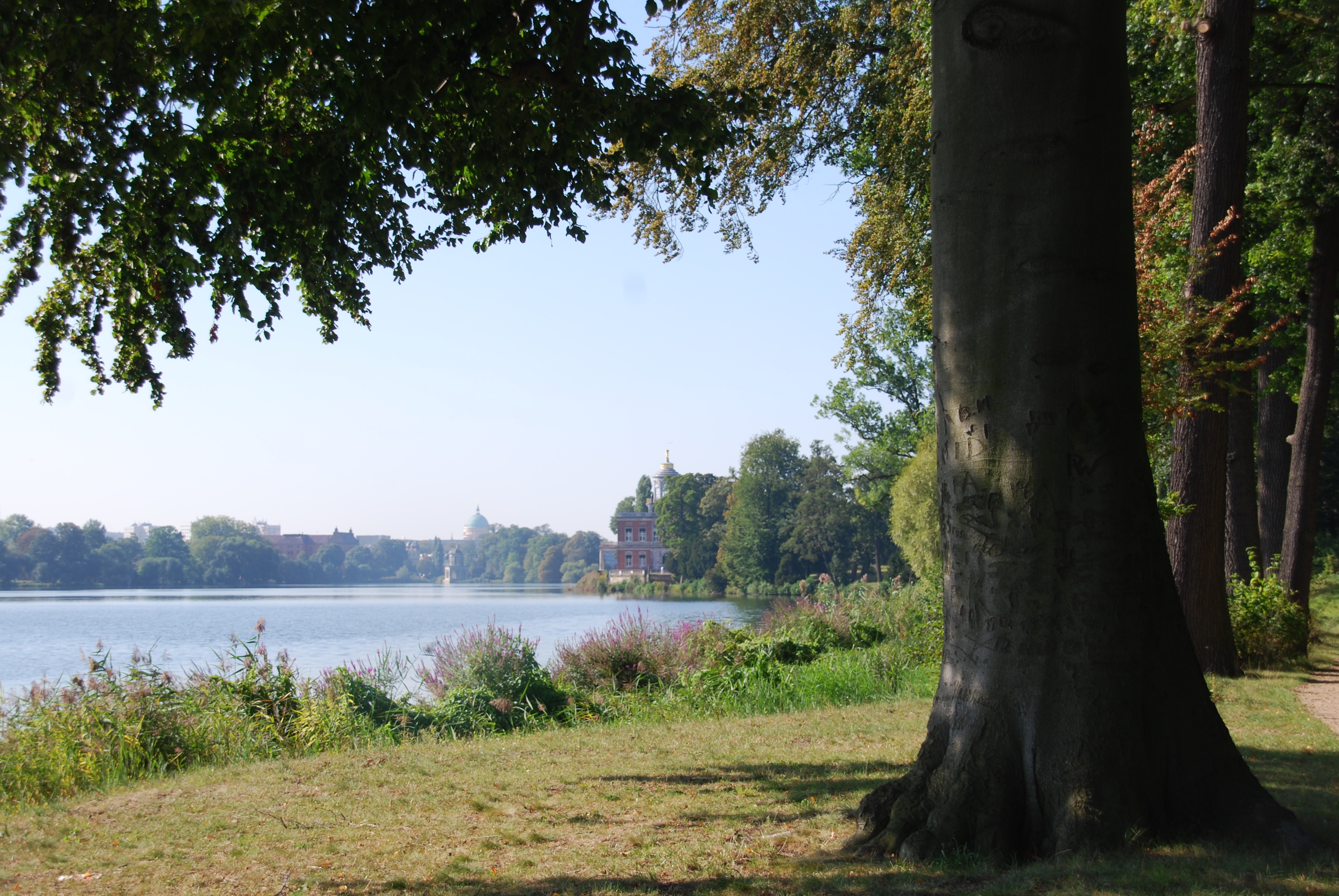 Neuer Garten Potsdam: Heiliger See mit Marmorpalais